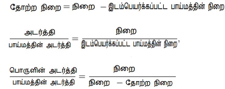 மேலுதைப்பு தொடர்பான சமன்பாடுகள்